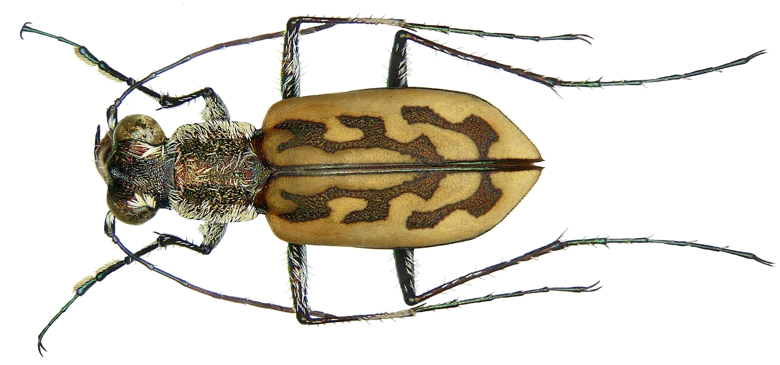 Familie: Carabidae Groesse: 11 mm Fundort: Senegal, M`Bour leg. U.Schmidt, 1992; det. J.Gebert Photo: U.Schmidt, 2007